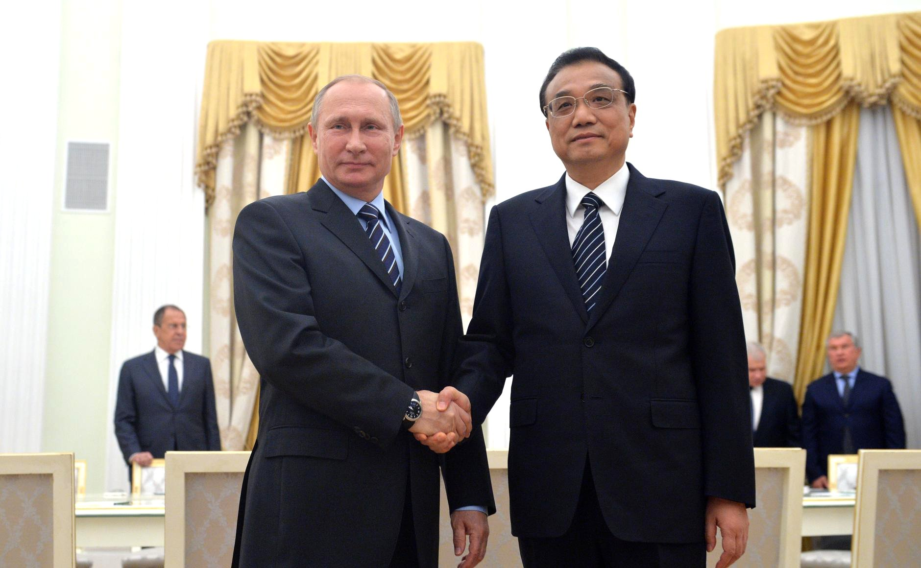 Встреча Президента России Владимира Путина с Премьером Государственного совета Китайской Народной Республики Ли Кэцяном